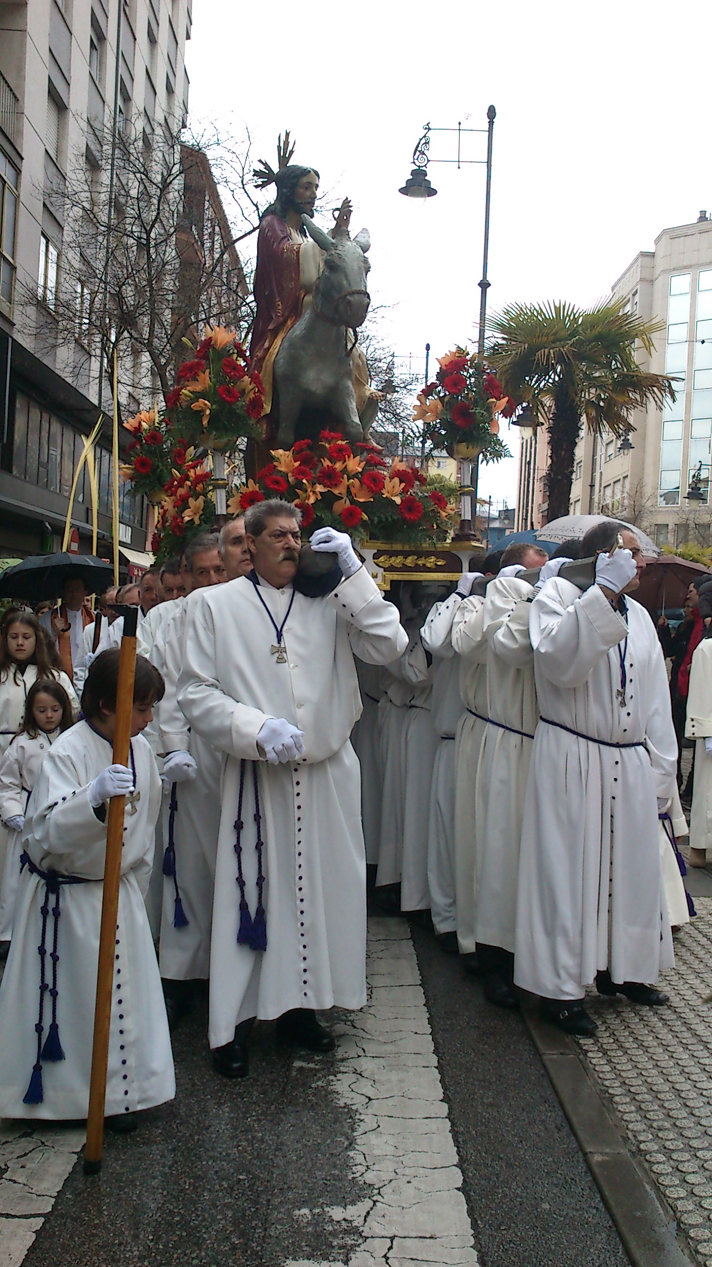 Paso 'Entrada Triunfal en Jerusalén' de la cofradía de Jesús Nazareno del Silencio de Ponferrada